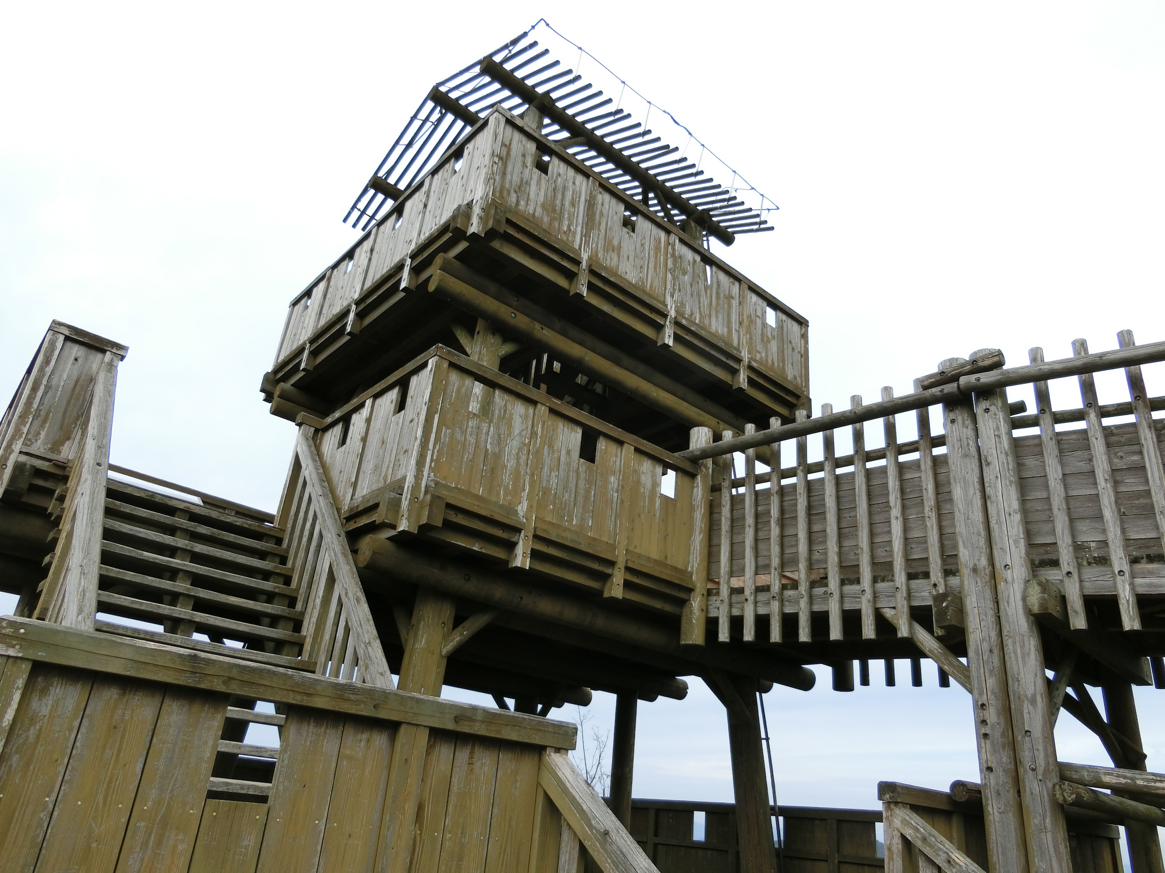 戦国時代の山城を再現した広島森林公園の山城展望台（広島市）